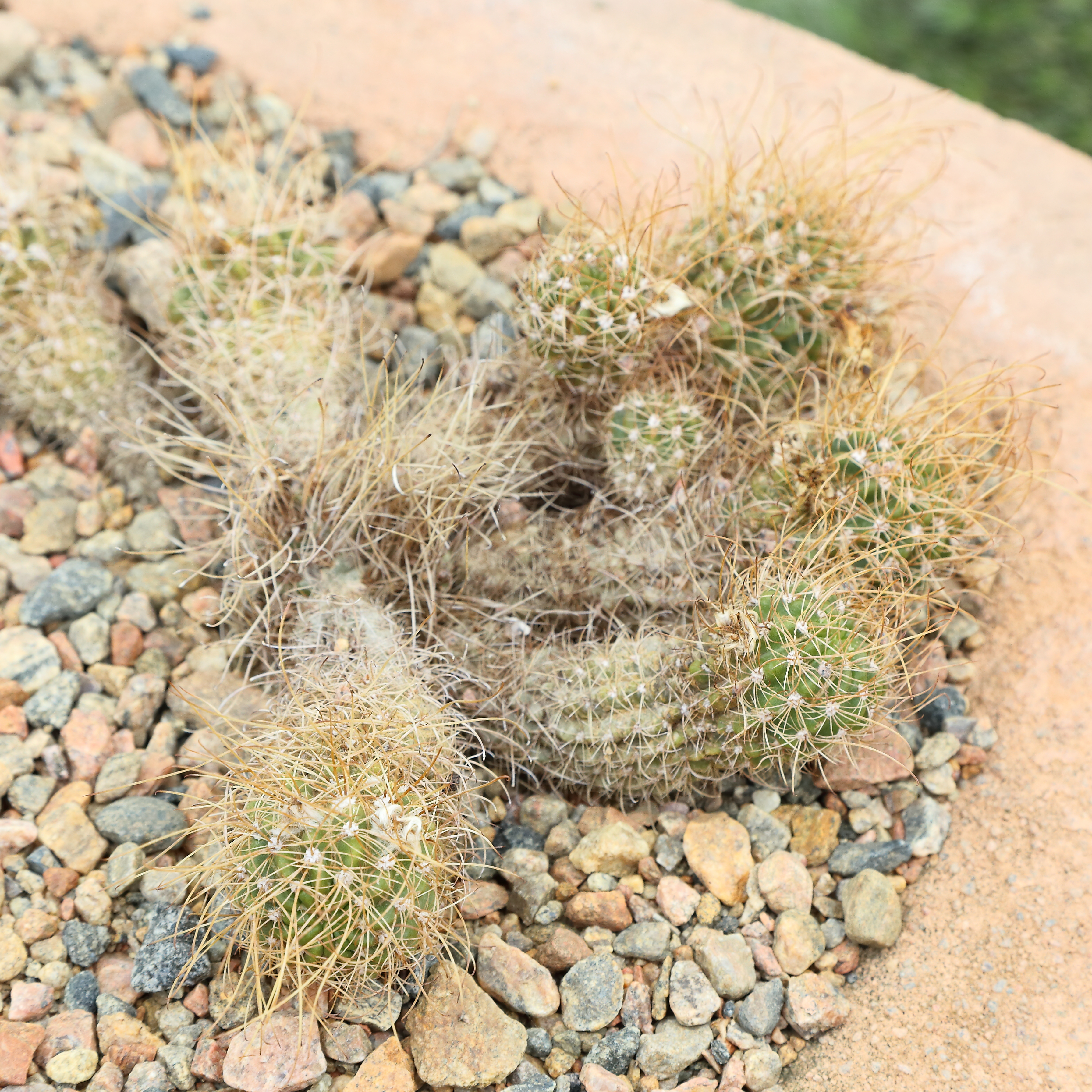 Echinopsis schieliana identifierad med hjälp av skylt i Göteborgs botaniska trädgård.